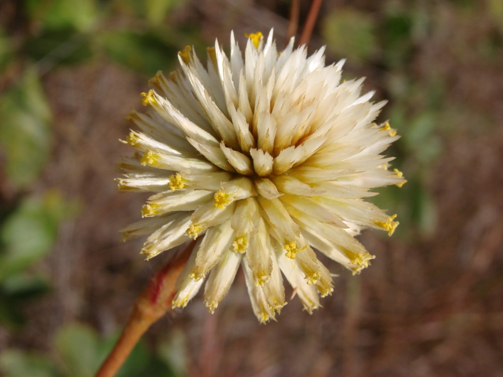 Gomphrena scapigera - AMARANTHACEAE - Parque Estadual do Biribiri - Serra do Espinhaço - Diamantina - Minas Gerais - Brasil.